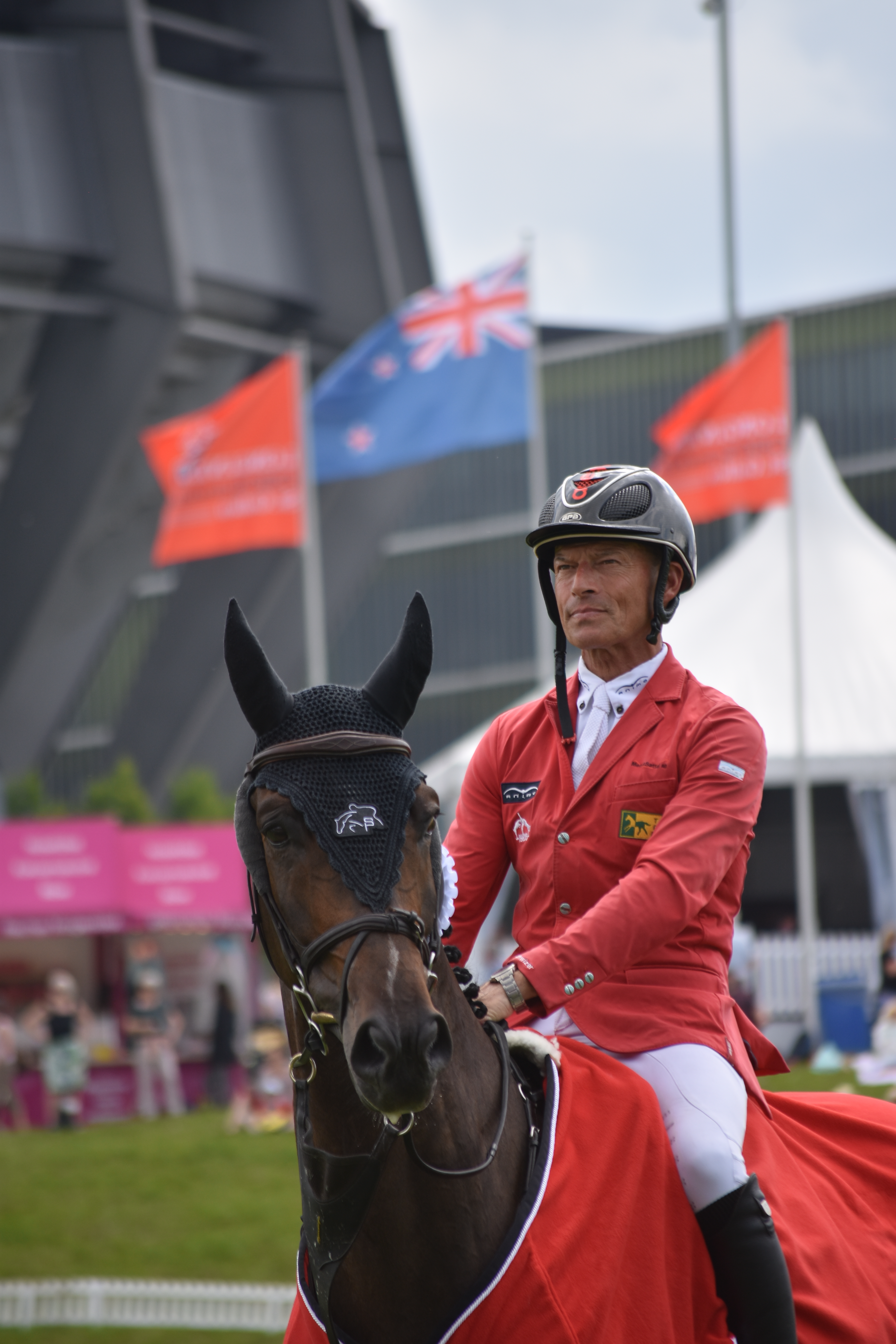 Pius Schwizer gewinnt den Preis der Liebherr International am CSIO St. Gallen 2018, auf Balou Rubin R, Siegerehrung